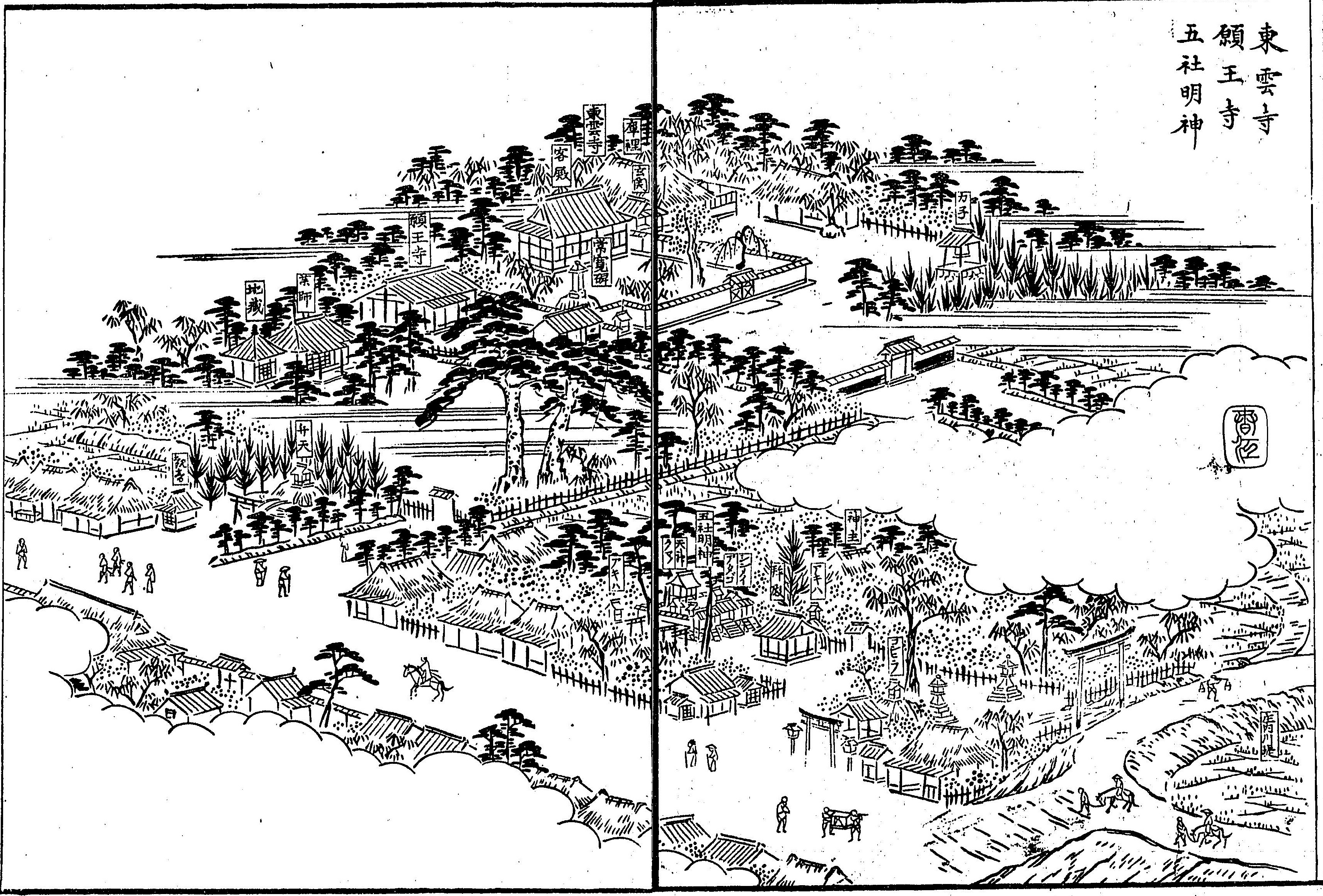 尾張国春日井郡中小田井村の東雲寺・願王寺・五社明神（五社神社）の江戸時代の様子。『尾張名所図会』国立国会図書館デジタルコレクションによる